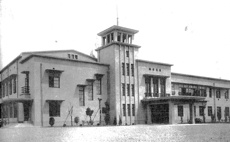 中文（台灣）: 台中教化會館，位於現今台中公園路與繼光路口，已拆除。